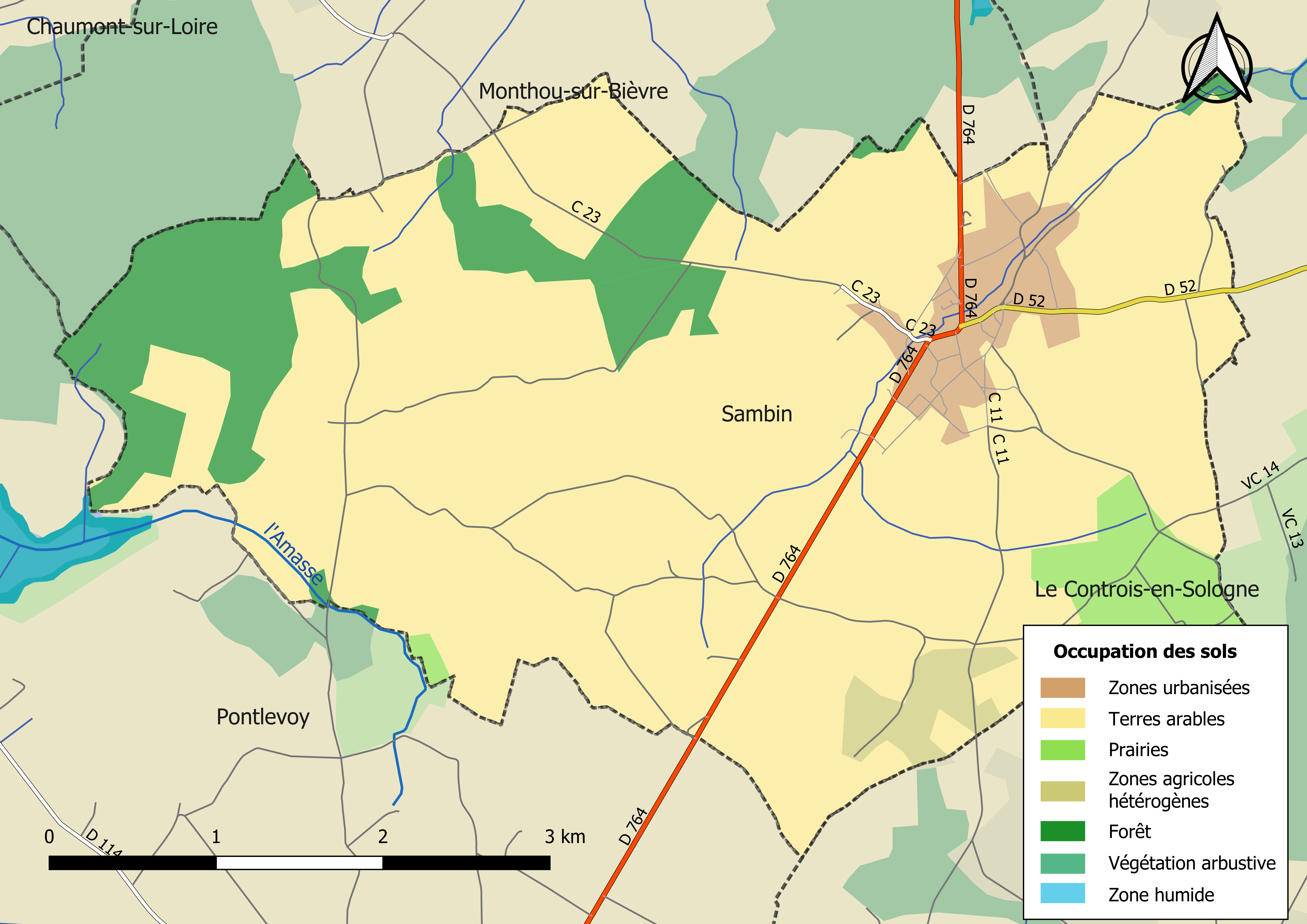 Carte des infrastructures et de l’occupation des sols en 2018 de la commune de Sambin (France).